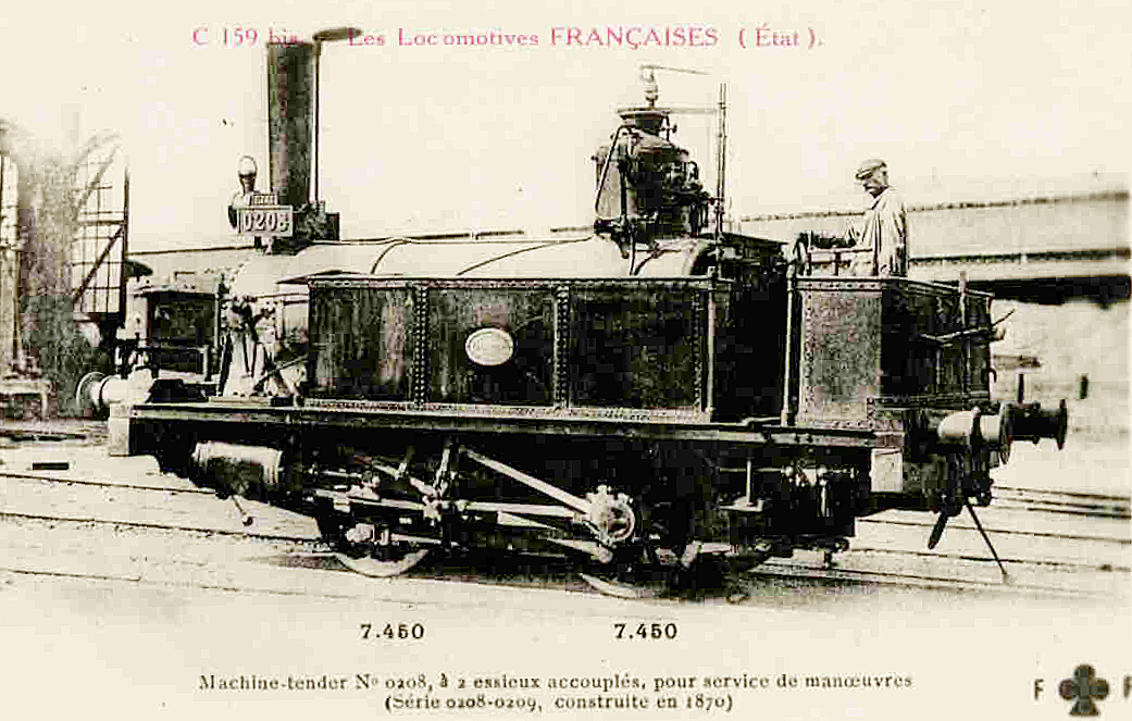 Locomotive 020 T construite par L Corpet n° 153 de 1870, livrée aux chemins de fer des Charentes n°501, devenue n° O208 État, puis 20001 État, réformée en 1919.